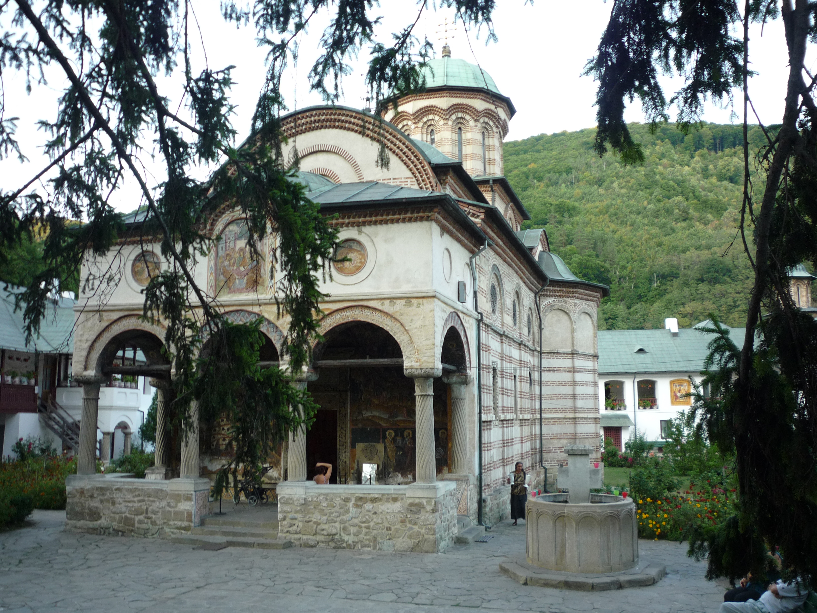 Cozia monastery, is built by Mircea cel Bătrân (Mircea the Old). With early 18th century Brâncovenesc style porch. It is situated near the River Olt.